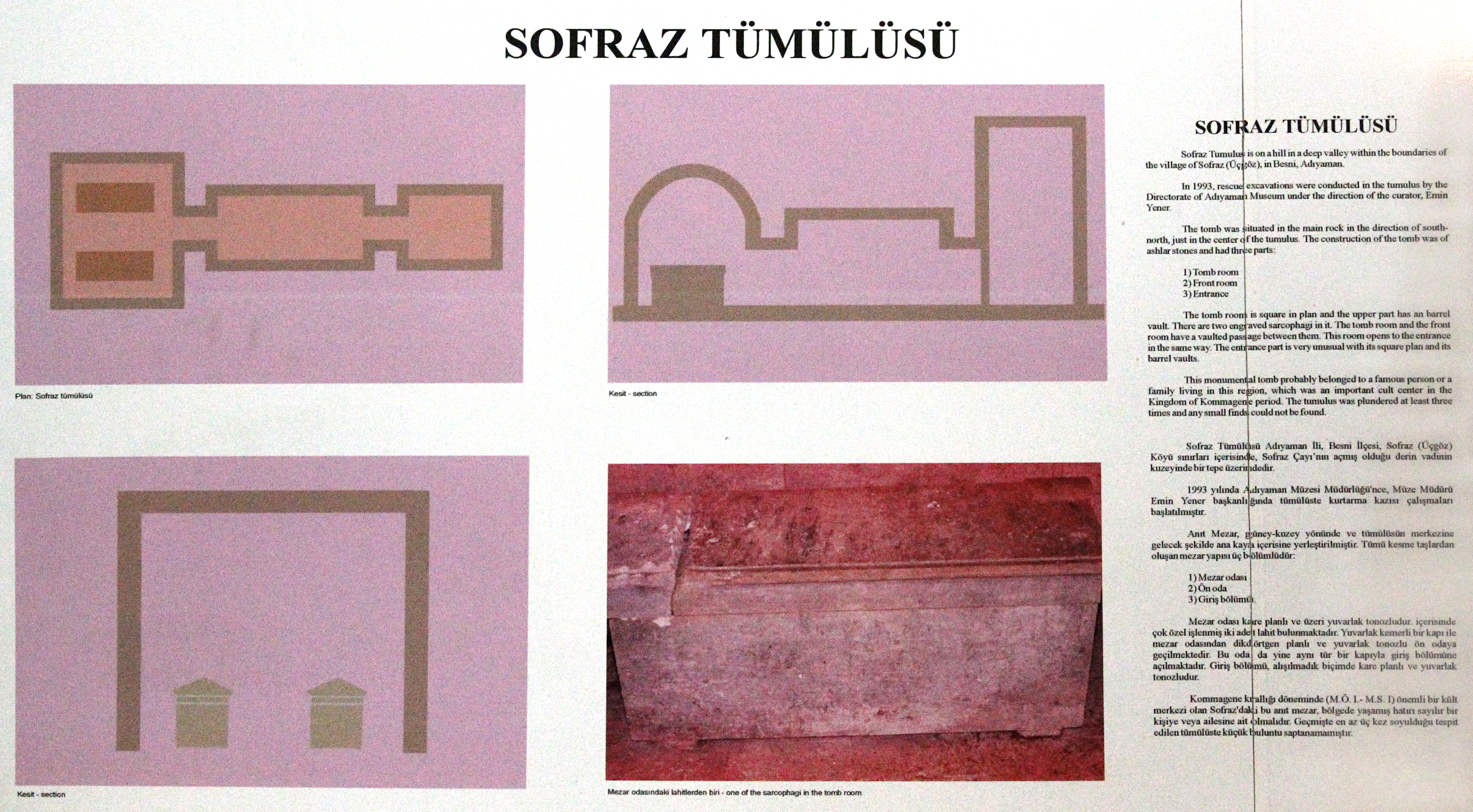 Grabhügel A von Sofraz mit Kammergrab, Umgebung von Besni, Südosttürkei, Plan im Archäologischen Museum Adıyaman